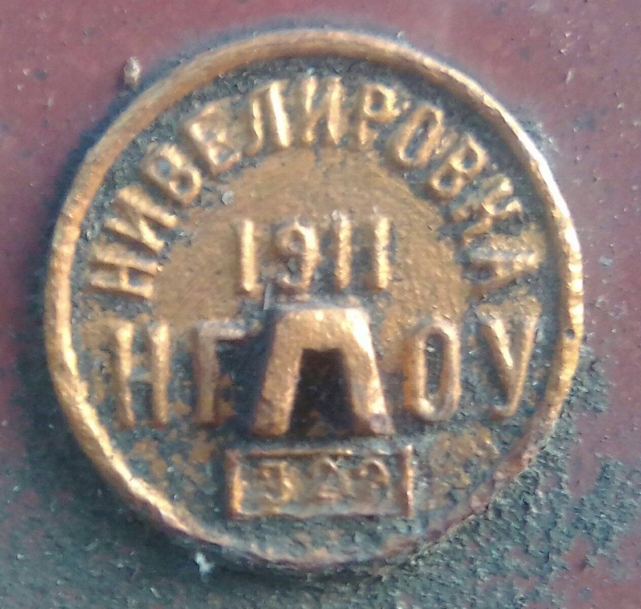 Нівелірна марка м. Миколаїв (обласне), вул. Нікольська, 29/1